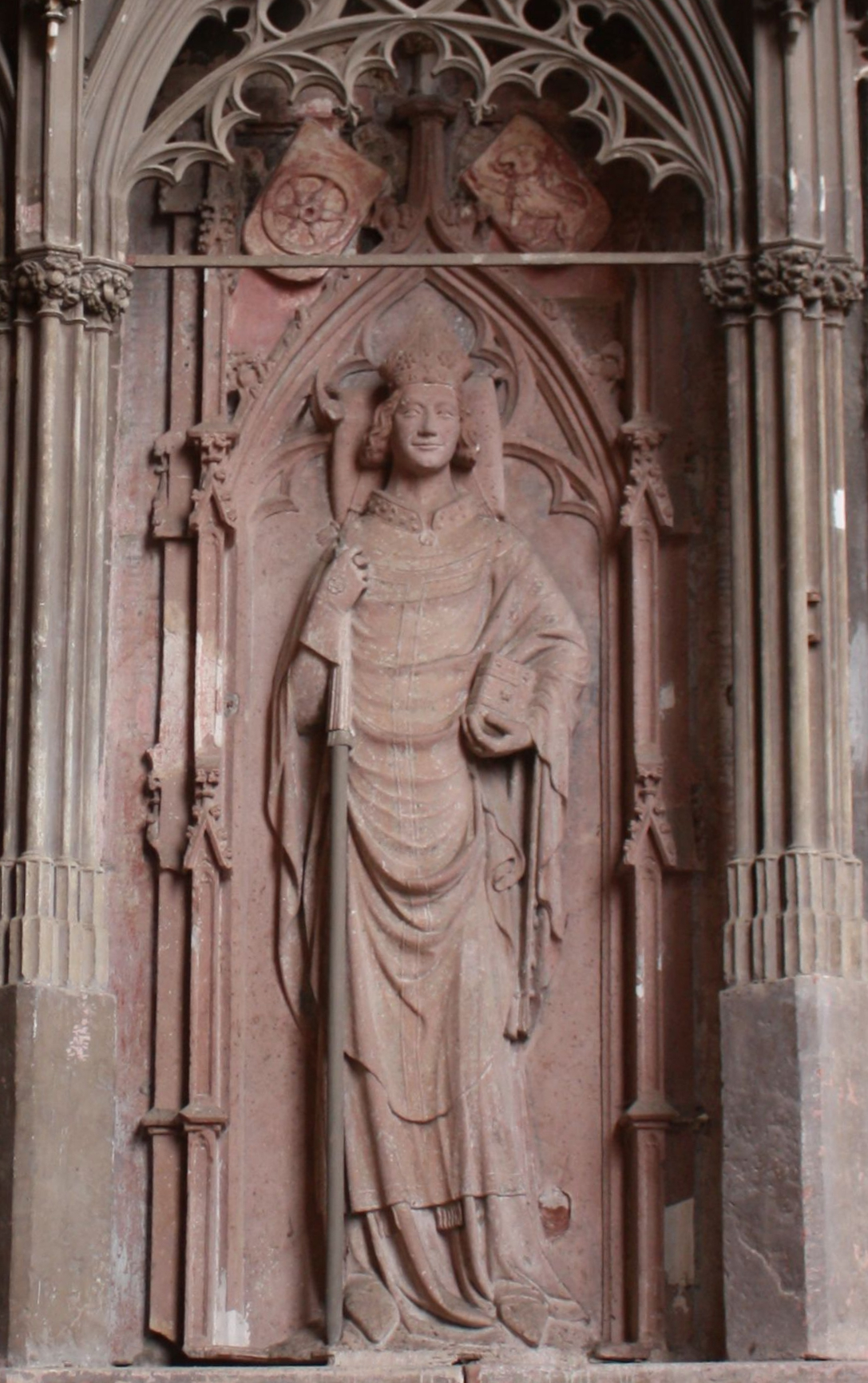 Grabplatte des Mainzer Erzbischofes Gerlach von Nassau (1322(?)-1371) in der Basilika des Kloster Eberbach (Nr. 55). Die Grabplatte bedeckte ursprünglich eine darunter liegende Gruft eines Wandnischengrabes mit Baldachinarchitektur, welches in der Breite der Platte an drei Seiten frei an der Nordwand des Chores stand. Die Grabananlage wird dem sogenannten Meister des Severi-Sarkophags zugeordnet. 1707 wurde das Grab in der heutigen Form umgestaltet. Die Gebeine Gerlachs von Nassau befinden sich seitdem in einer Wandnische hinter der nun aufgerichteten Grabplatte. (Quelle: Yvonne Monsees: Grabmäler im Kloster Eberbach, Freundeskreis Kloster Eberbach e.V. 2009, ISBN 978-3-00-027060-4)